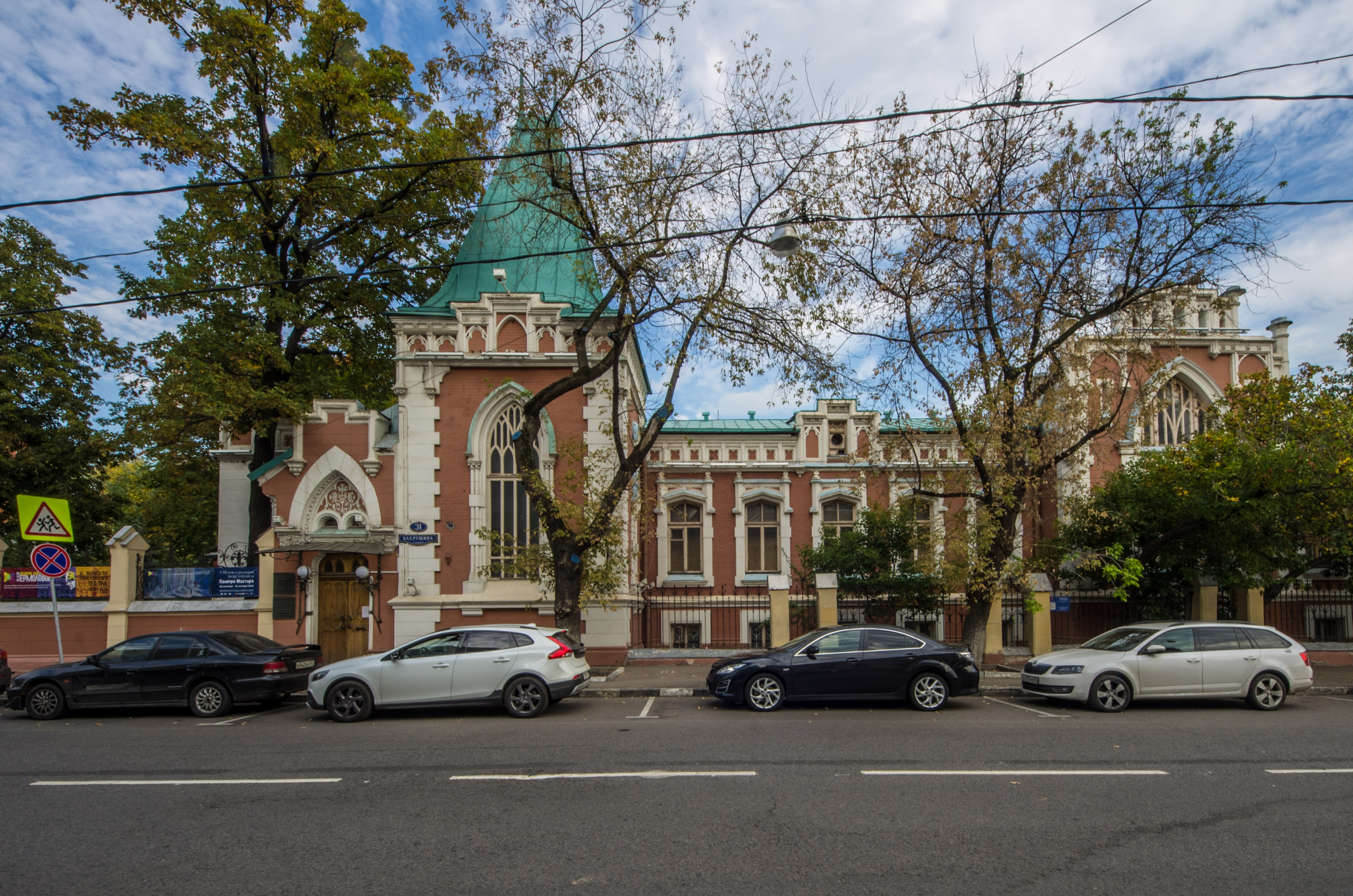 Здание музея им.Бахрушина: Бахрушина ул., дом 31/12, строение 1, Замоскворечье, Центральный округ, Москва